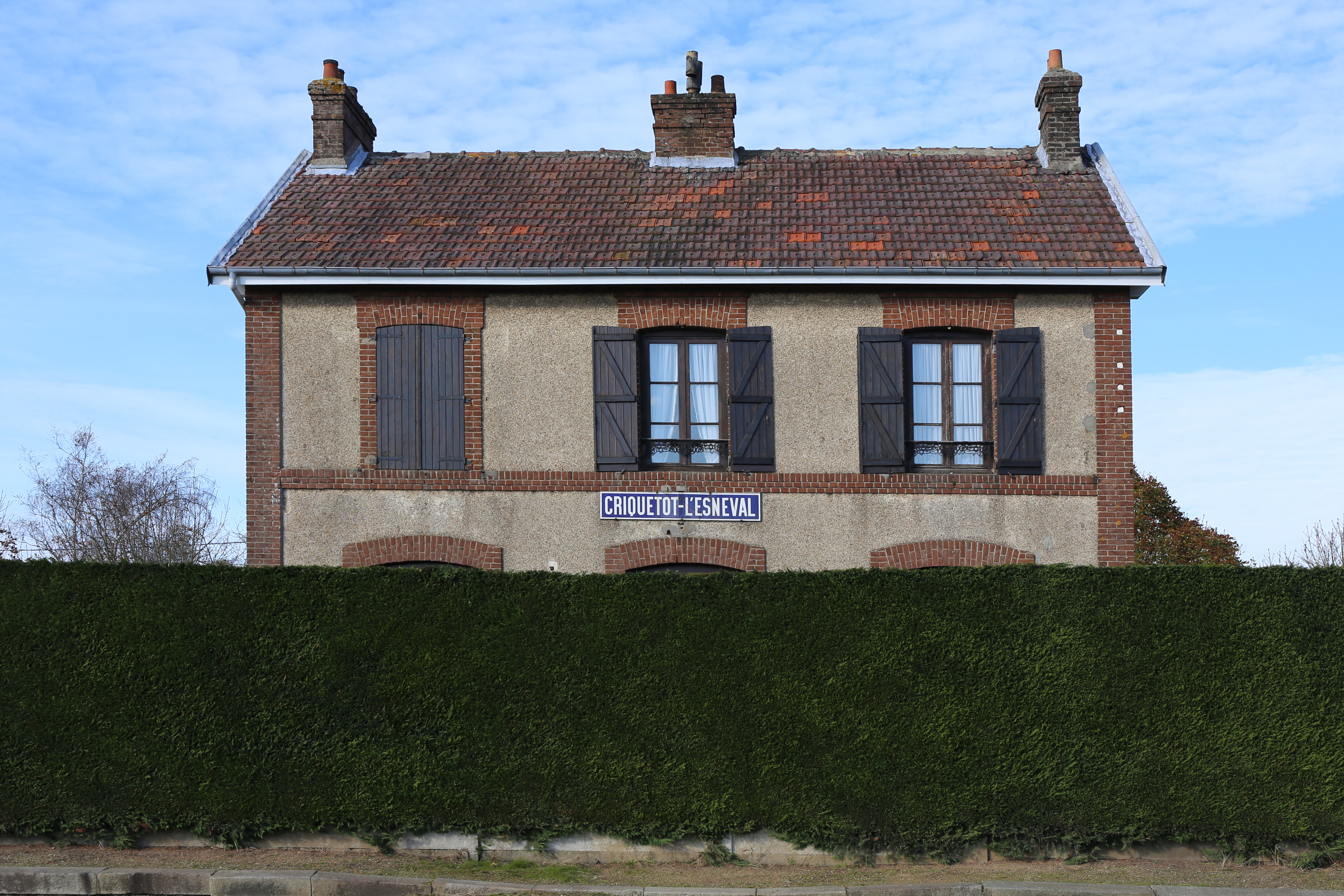 Ancienne gare de Criquetot-l'Esneval sur la ligne du Havre-Graville à Tourville-les-Ifs.